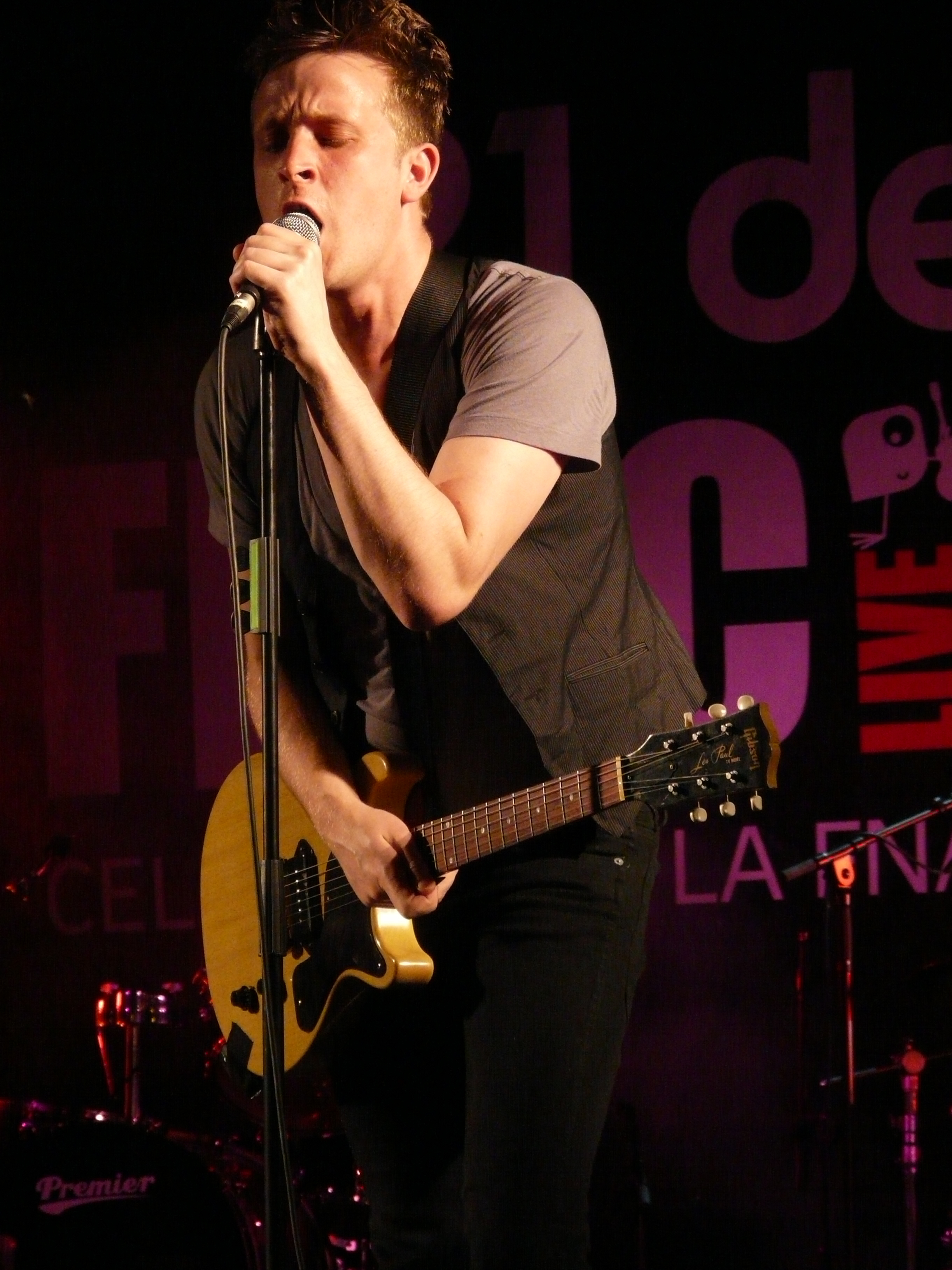 En el Día de la música, escenario de Vázquez de Mella, Madrid.